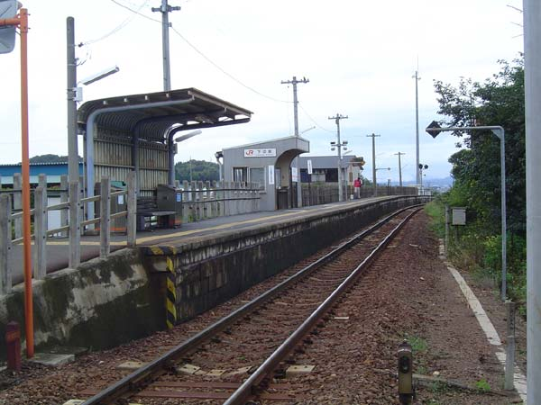 JR東海太多線 下切駅 2004年9月6日投稿者(Kone)が撮影